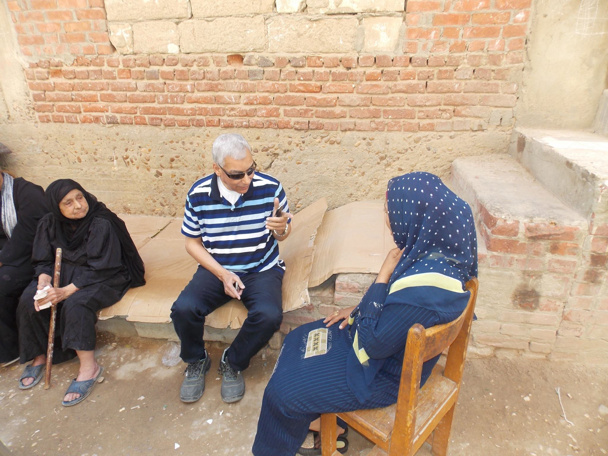 تدخل السيد اللواء لحل مشاكل بعض أهالى عزبه الهجانه